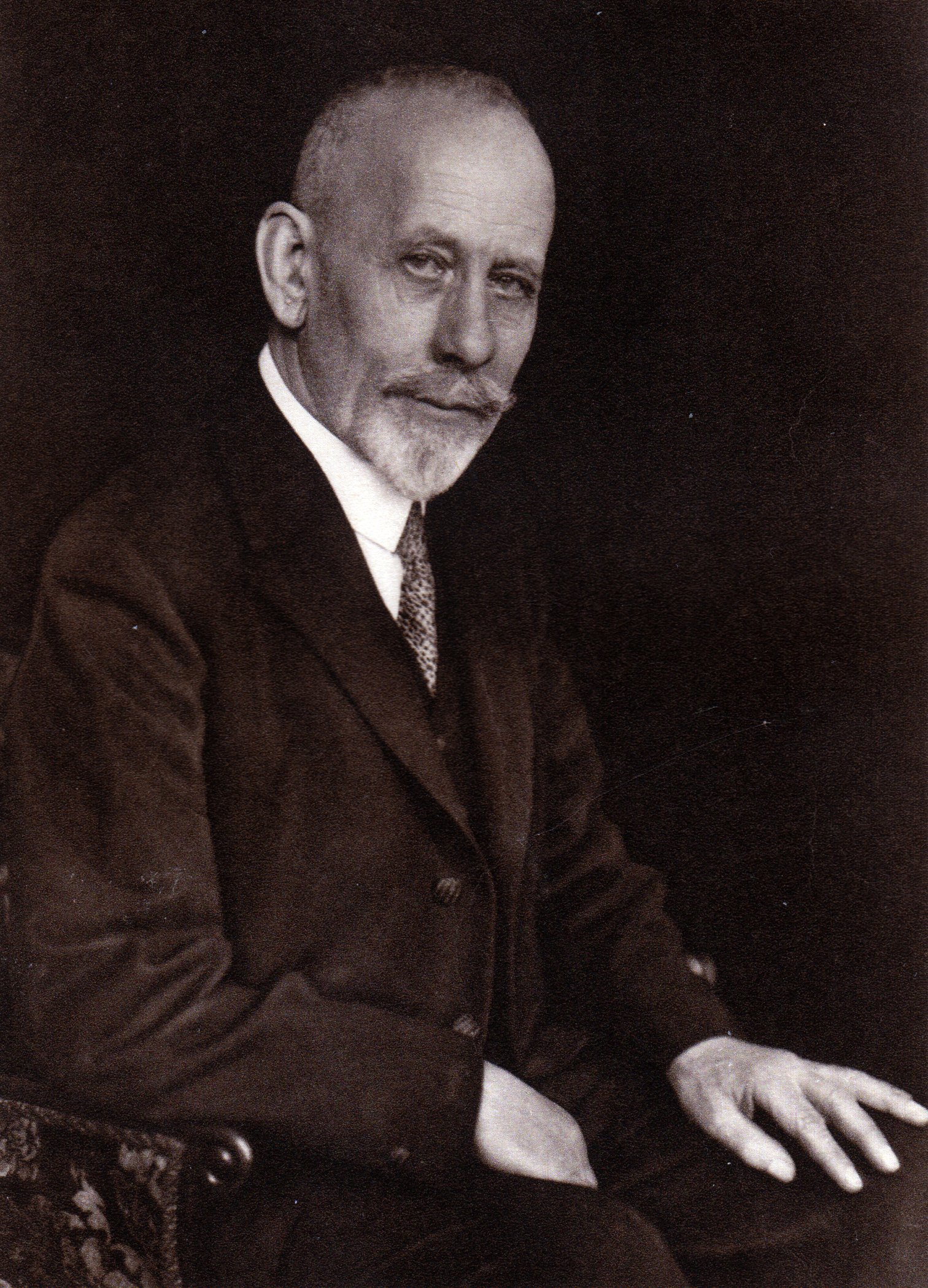 August Madsack, gründete am 31. Dezember 1892 die Gesellschaft „Hannoverscher Anzeiger A. Madsack & Co.""